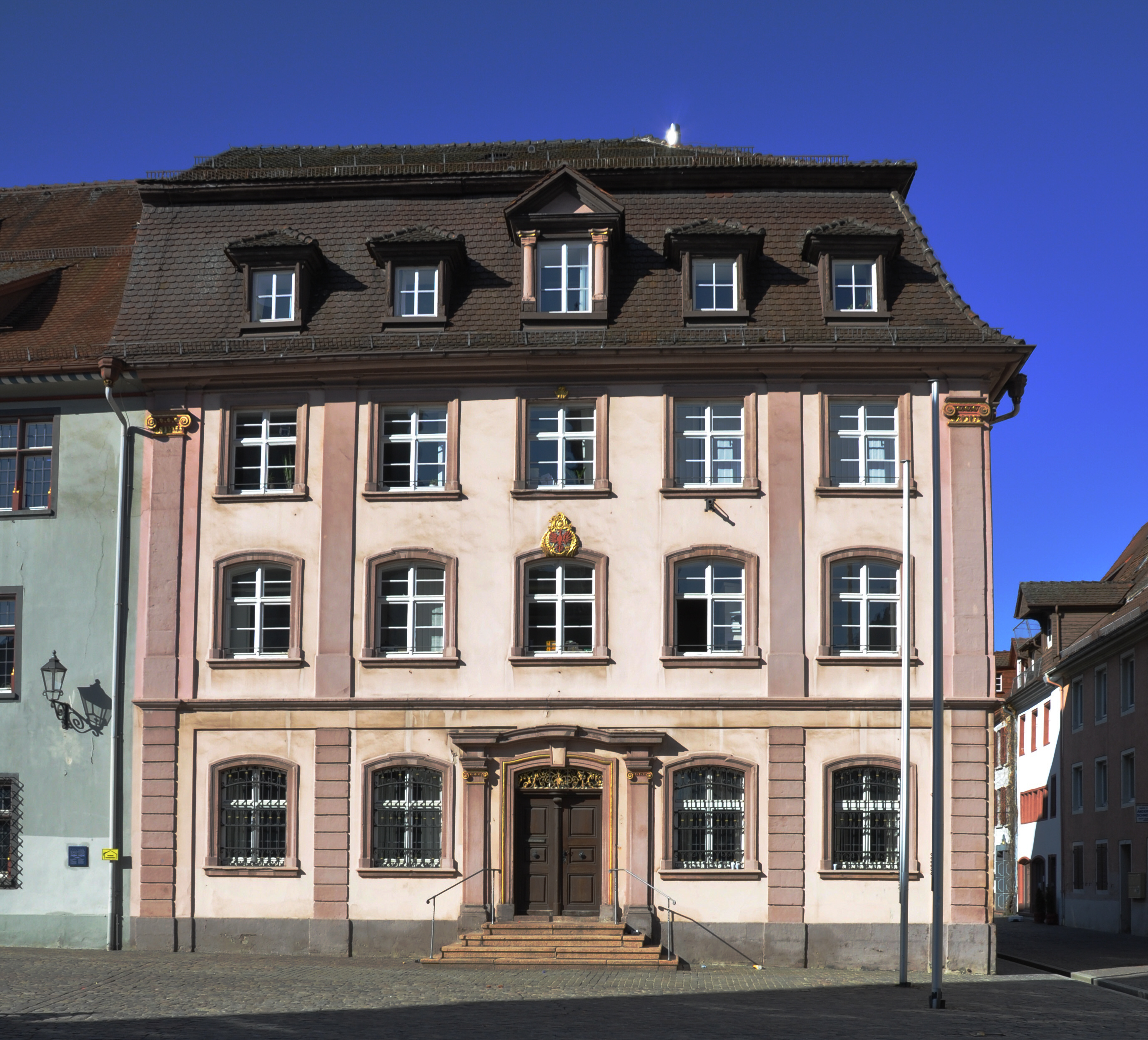 Villingen-Schwenningen, Stadtbezirk Villingen Rathaus, Gebäude Münsterplatz 8